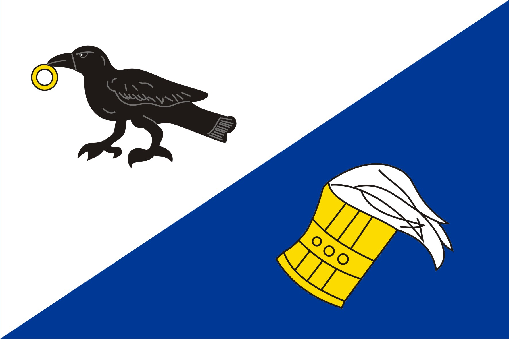 Vlajka obce Radkov v okrese Žďár nad Sázavou